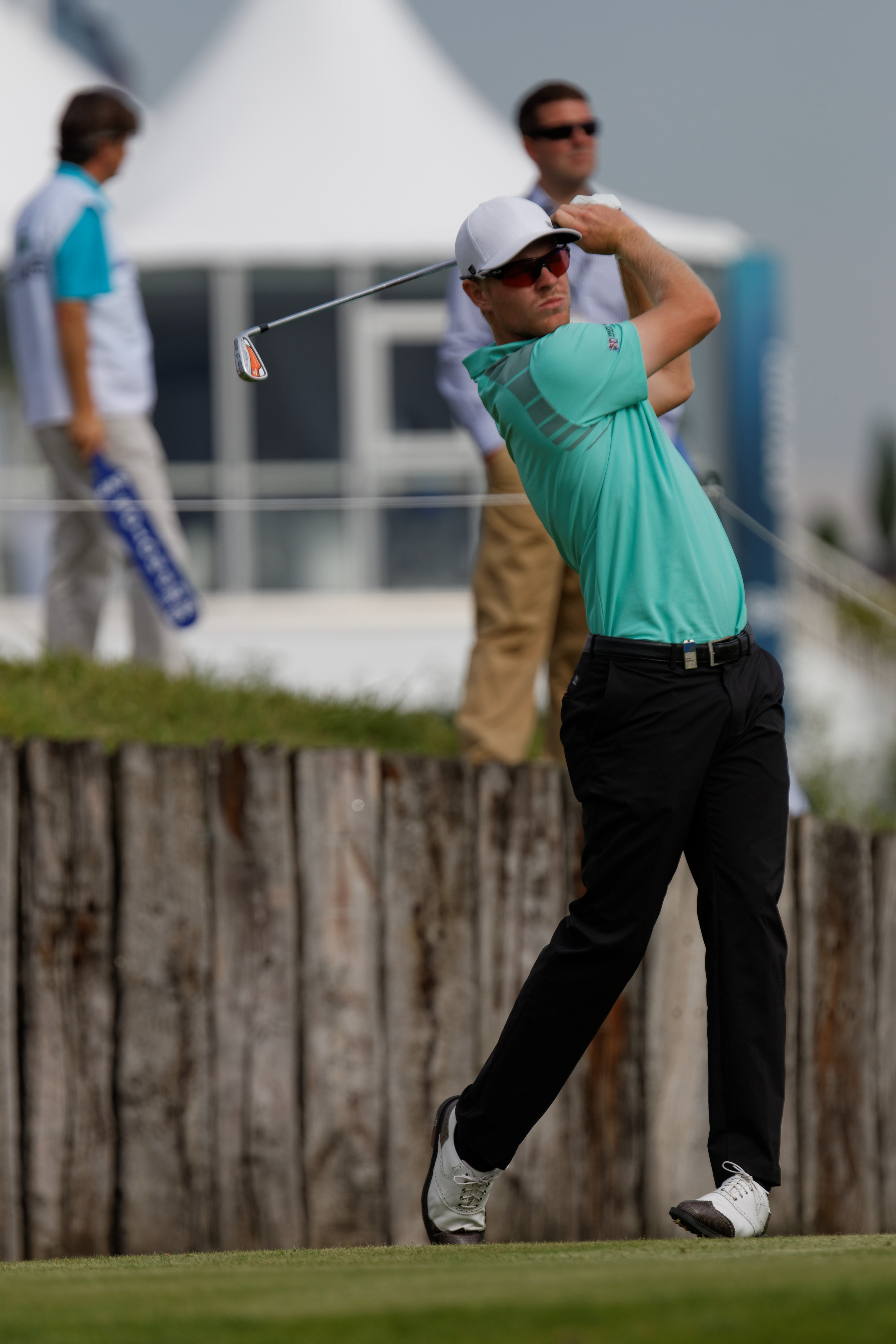 Jens Dantorp lors du second tour de l'Open de France 2014 - Golf National - Saint-Quentin-en-Yvelines (78) - départ du trou n° 10